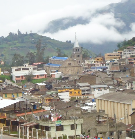 San José de Chimbo en la Républica del Ecuador.